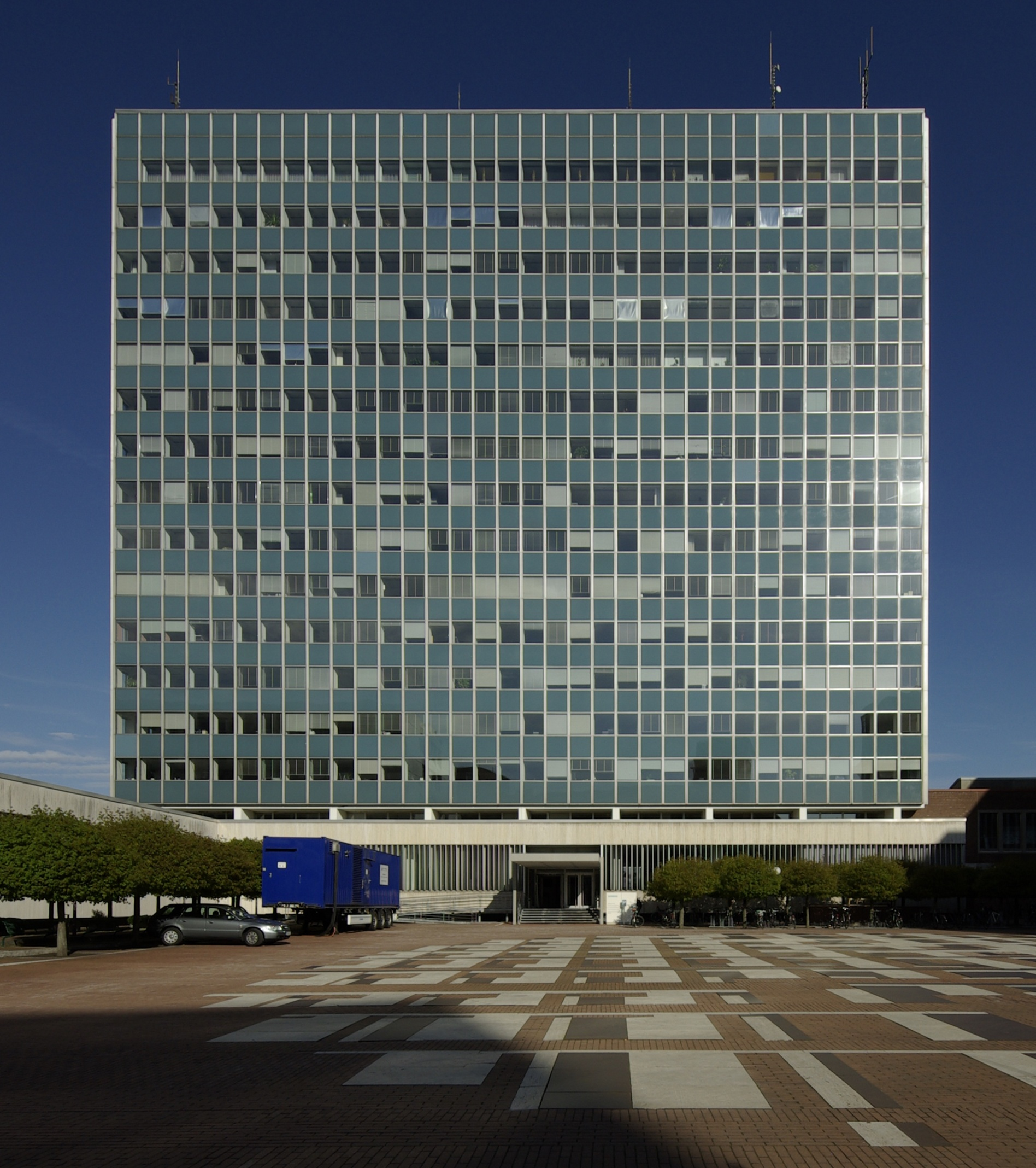 Der sogenannte Glaspalast der Firma Siemens in Erlangen, 1959 bis 1962 für die Siemens-Schuckertwerke errichtet, Architekt: Hans Maurer